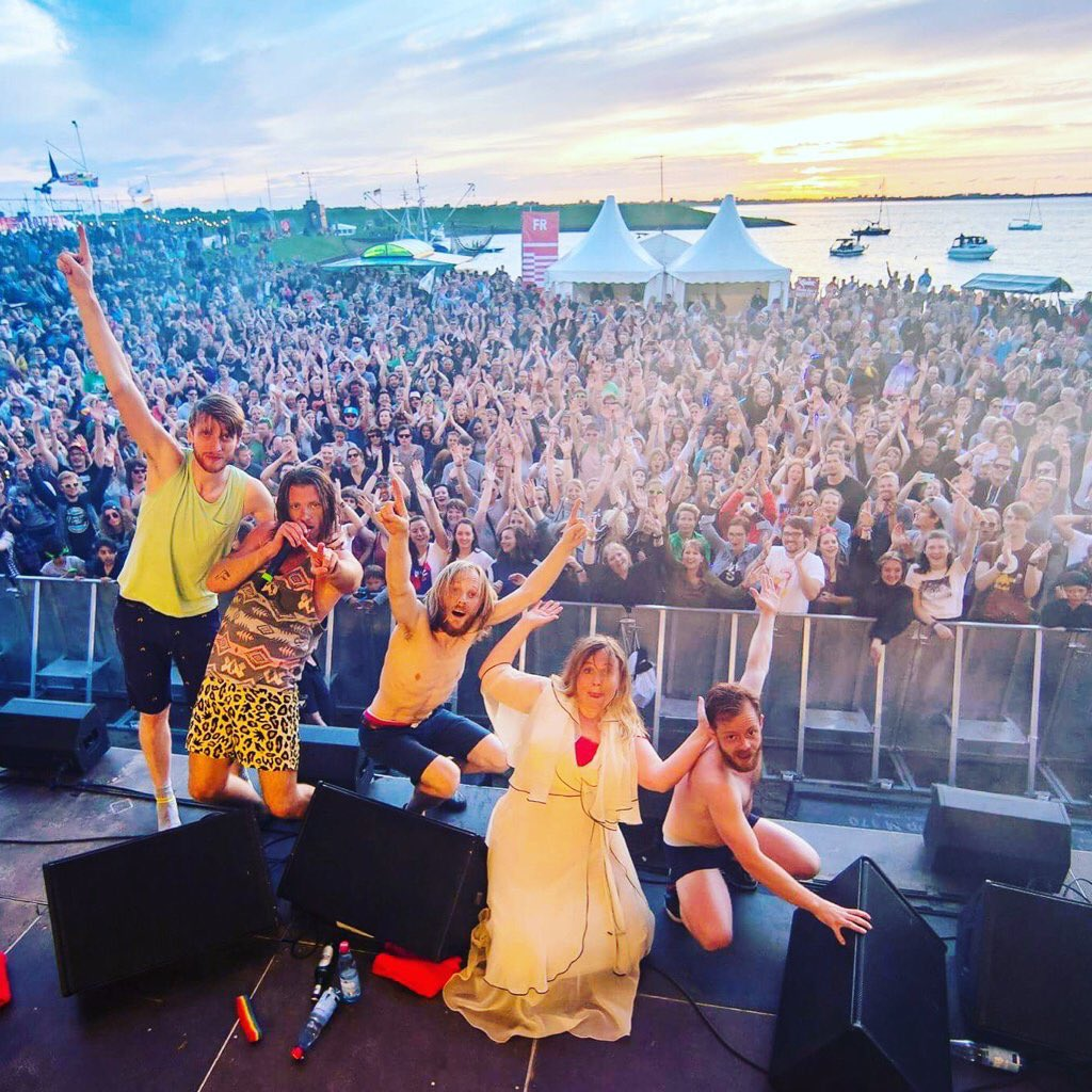 FM Belfast en Allemagne 2016